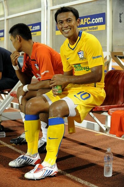 ธชตวัน ศรีปาน